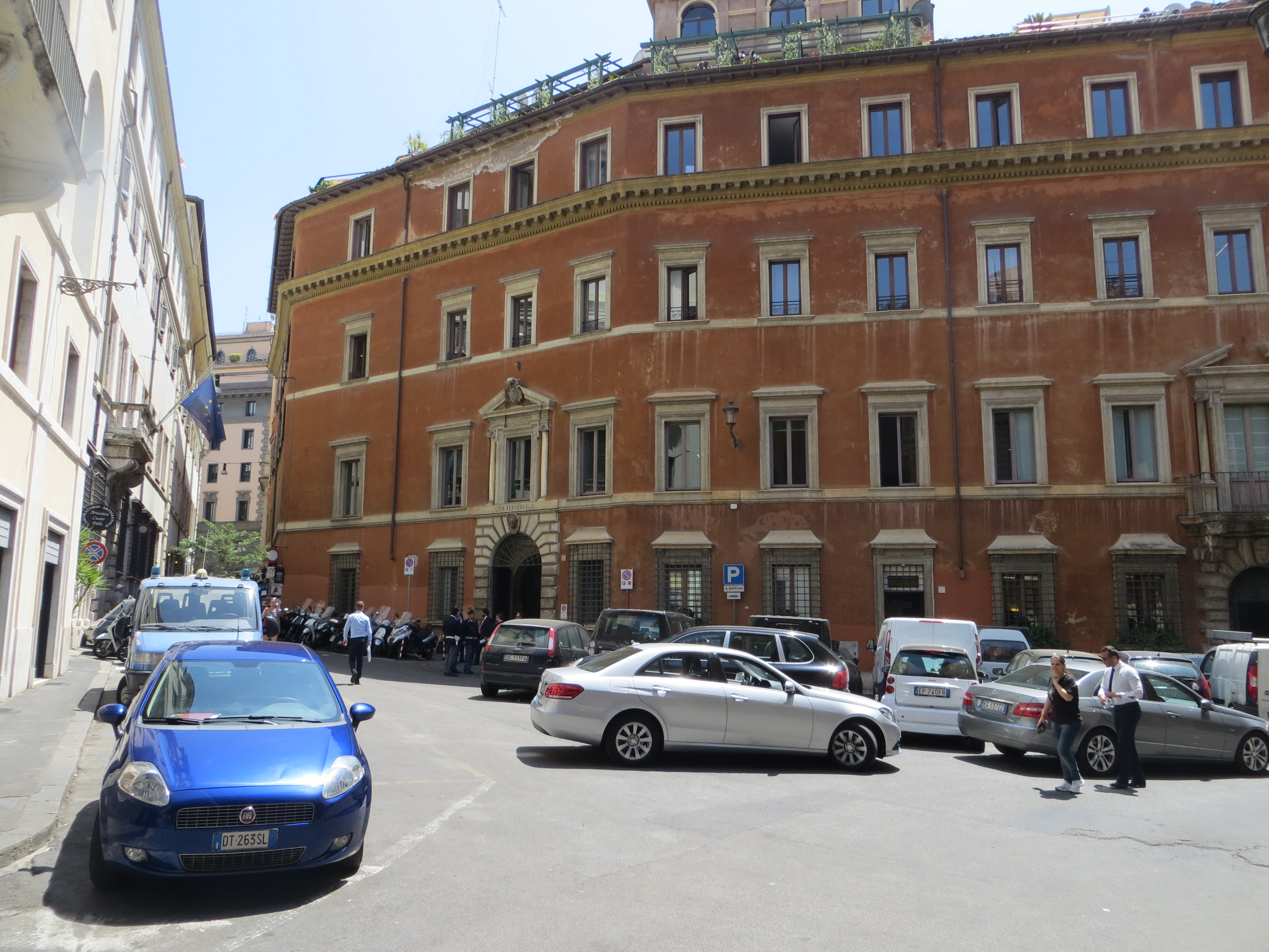 Largo del Nazareno, Rome, May 2015